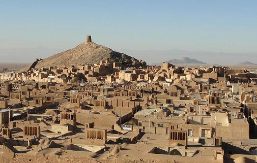 شهر تاریخی انارک.